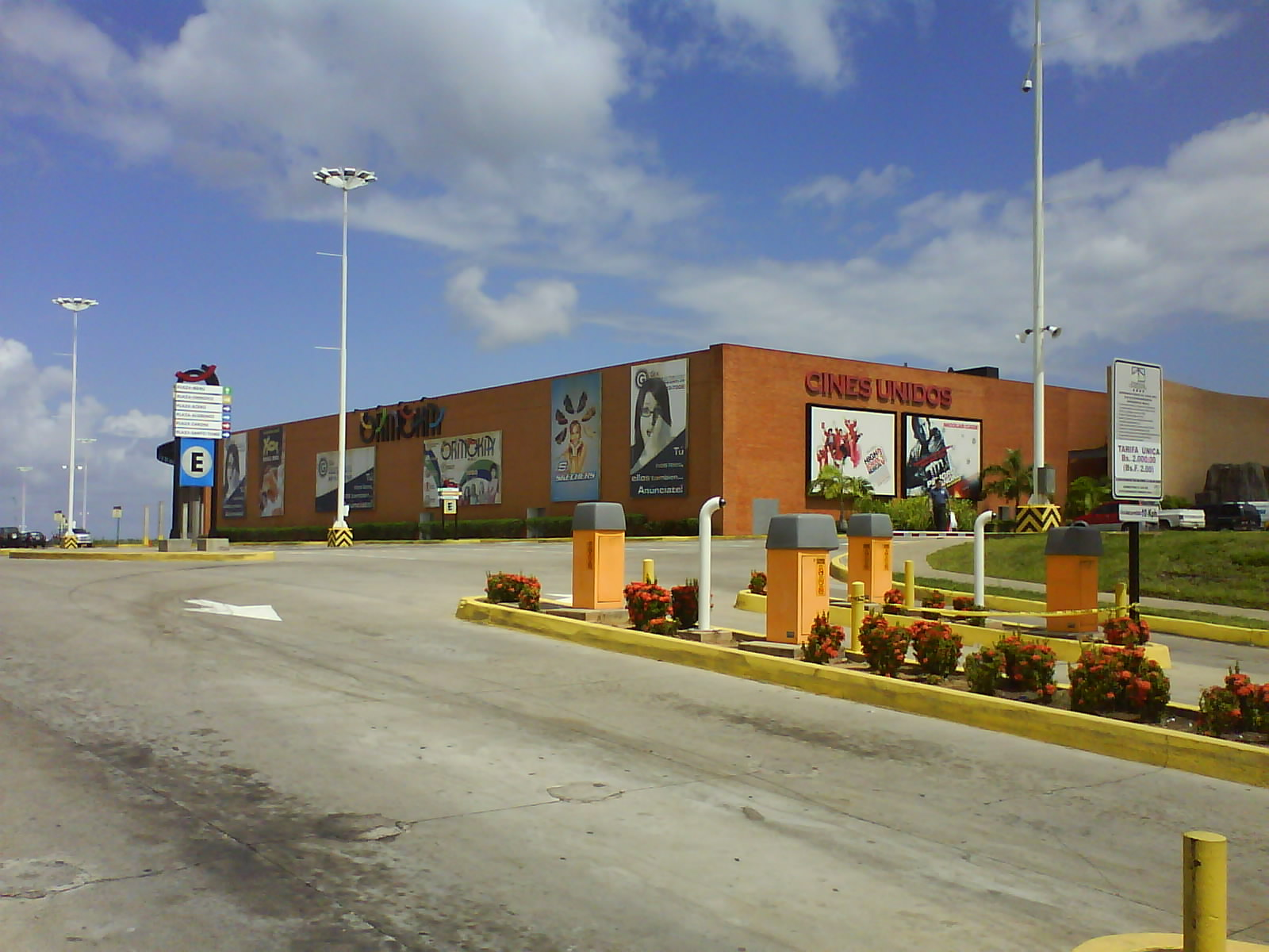 Entrada de Orinokia Mall Center